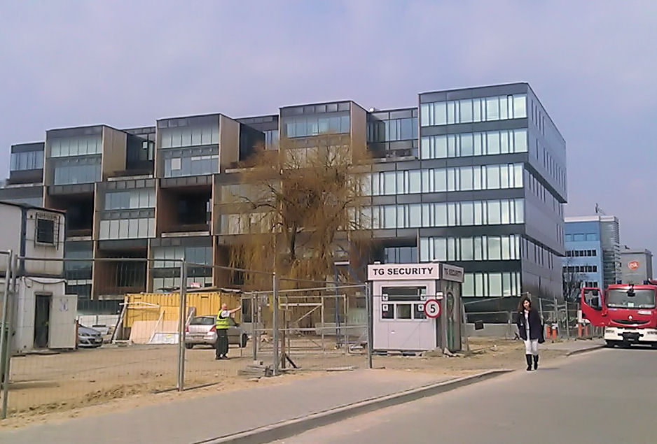 Pixel, ul. Babimojska, Poznań